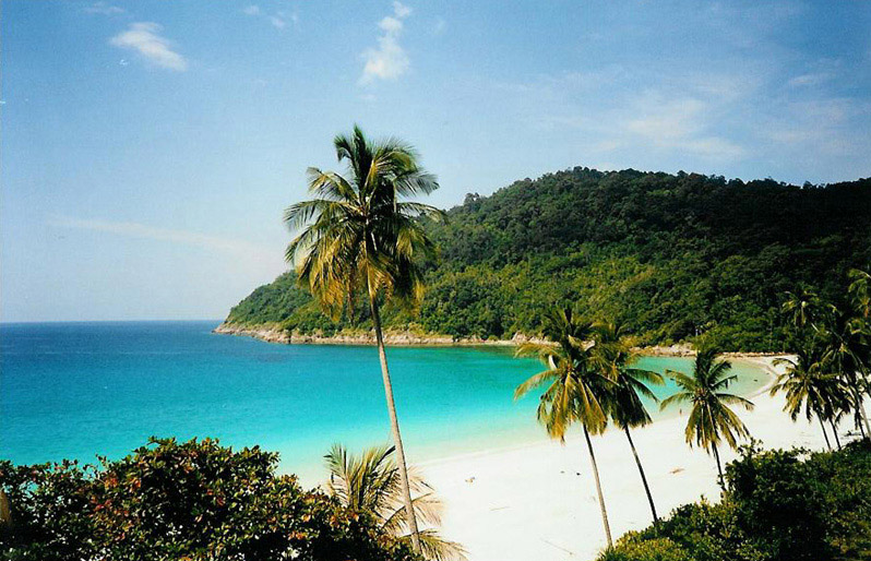 Redang Island - Malaysia 1999